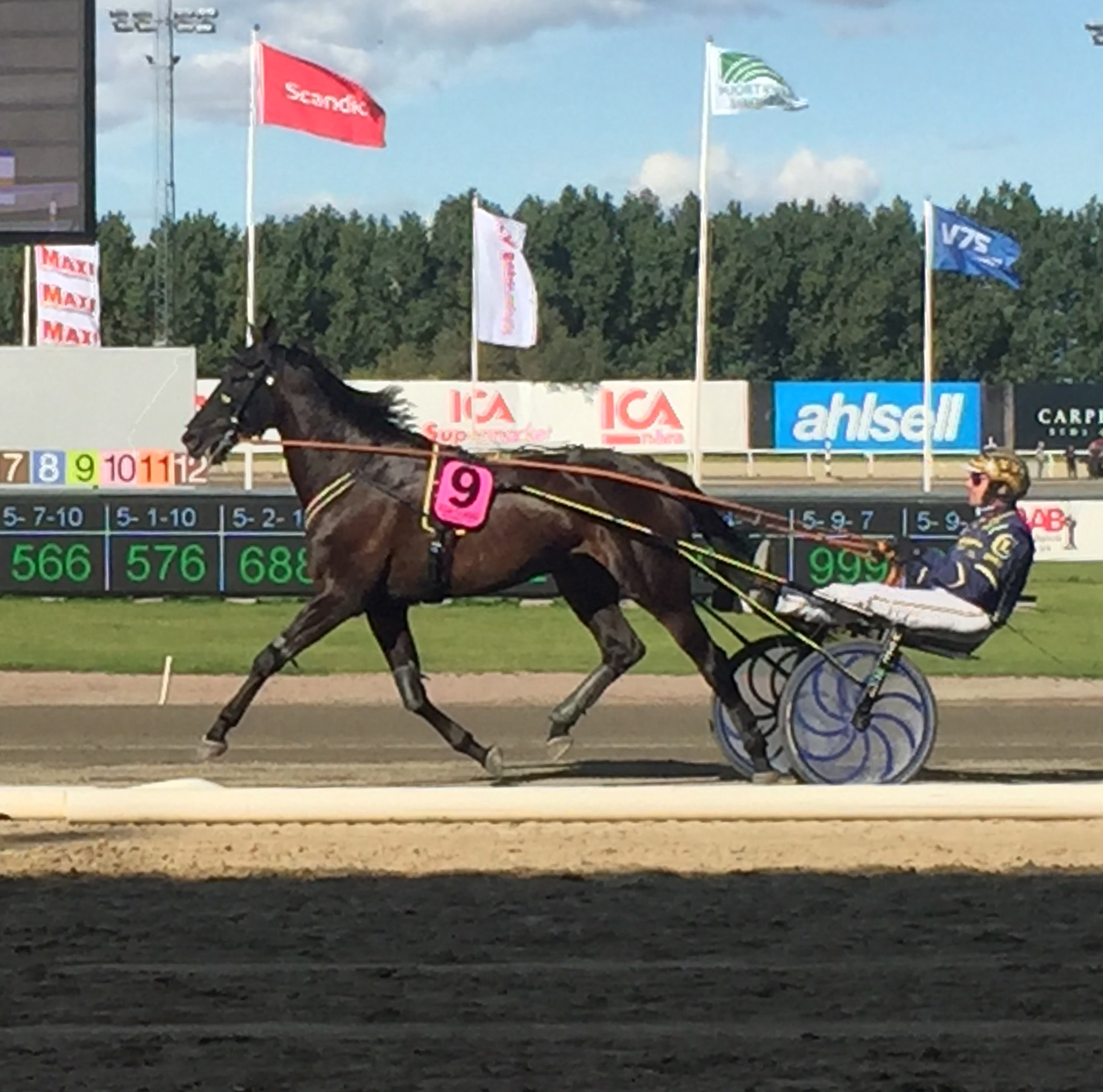 Conrad Lugauer och hästen Gareth Boko inför finalen av Svenskt Travderby 2017.